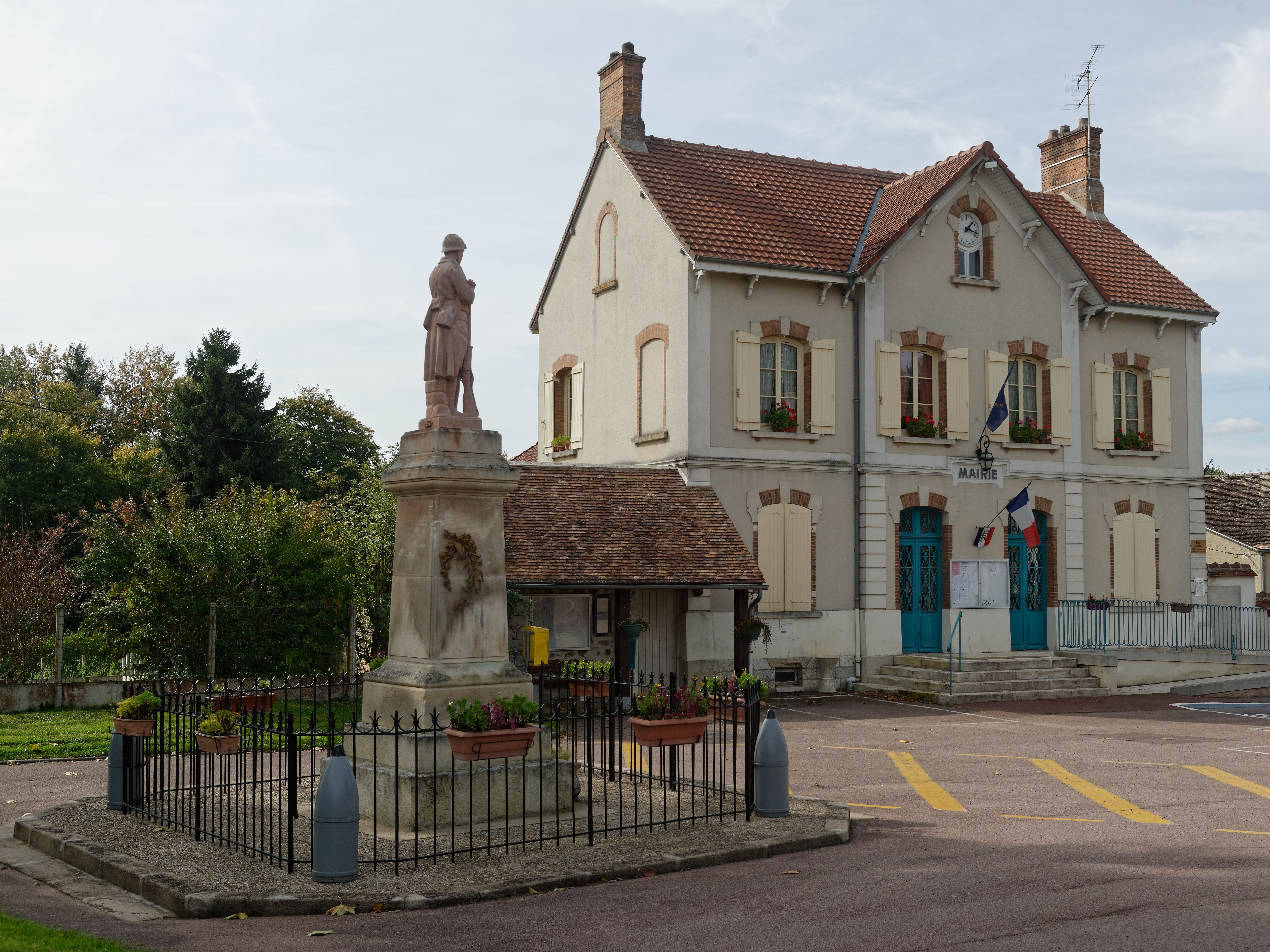 Mairie et monument aux morts à Diant, en Seine-et-Marne, dans la région Île-de-France